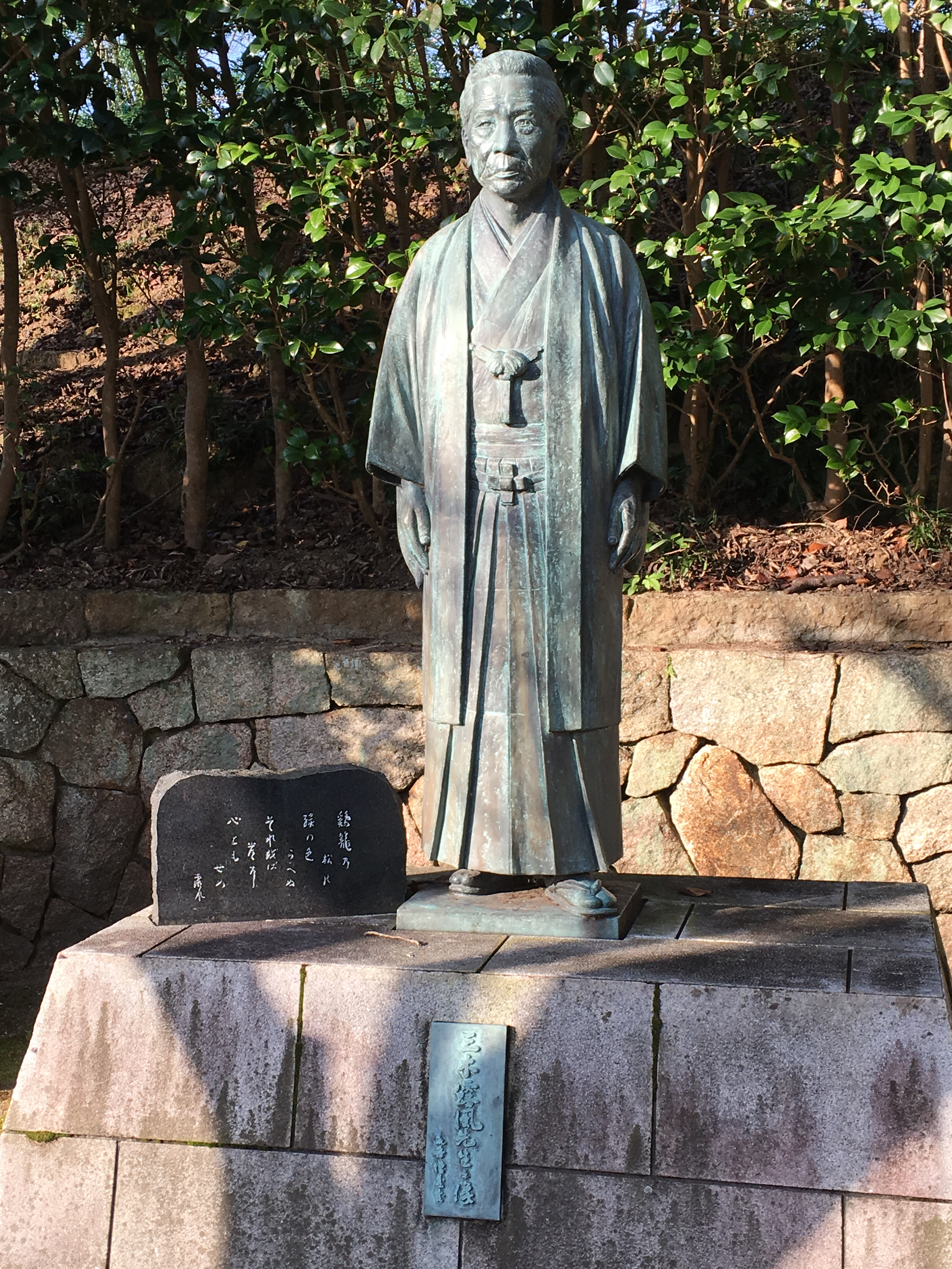 兵庫県たつの市 三木露風 銅像